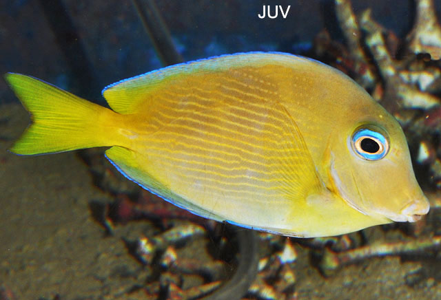 Acanthurus coeruleus. (Curacao)